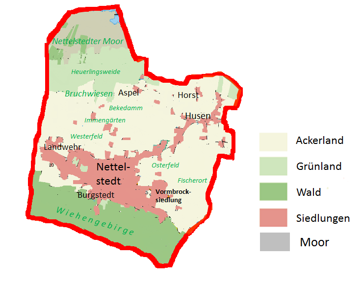 Flächennutzung Nettelstedt